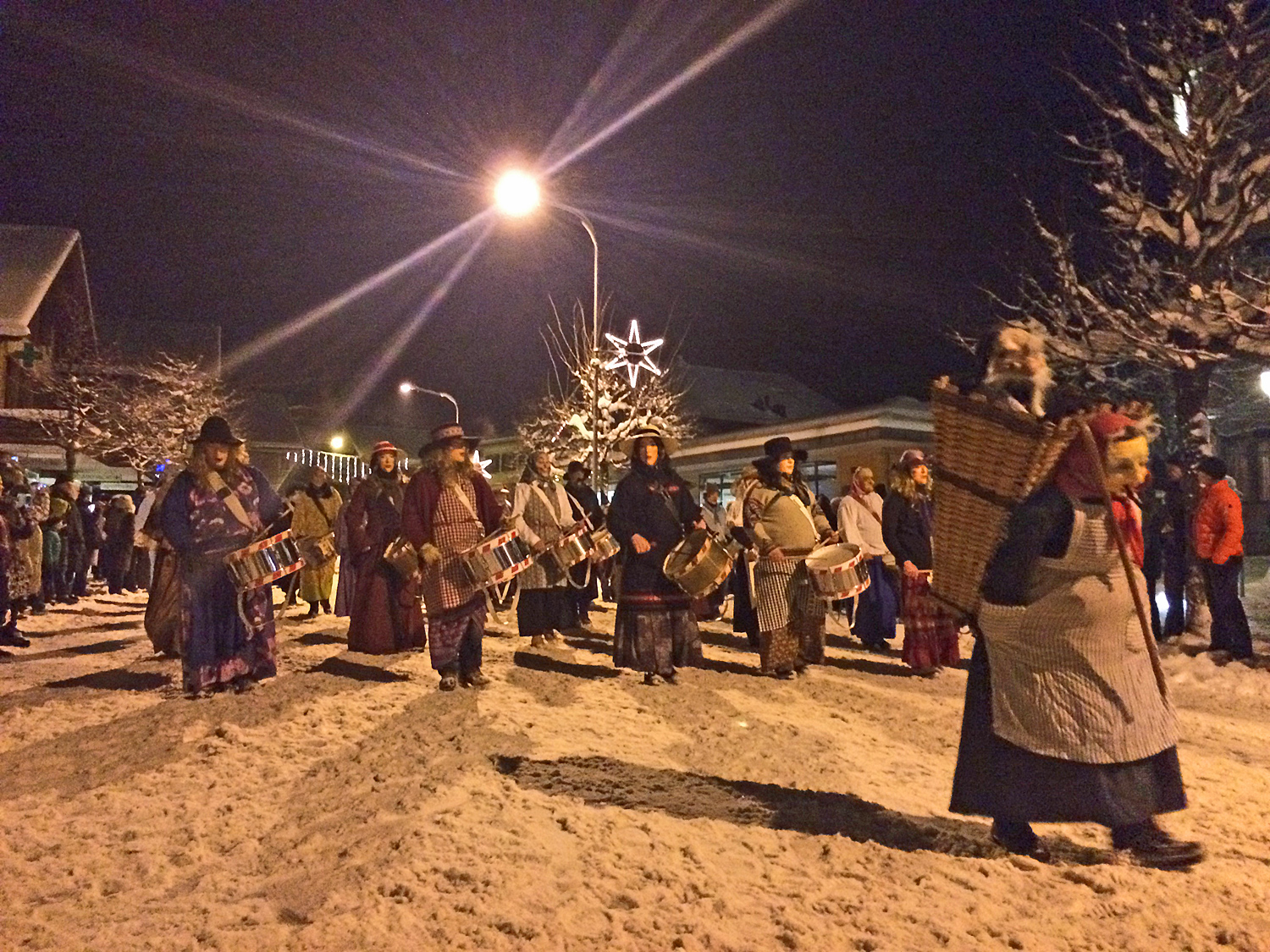 Ubersitz in Meiringen (30. Dezember 2014) – Trychlerumzug